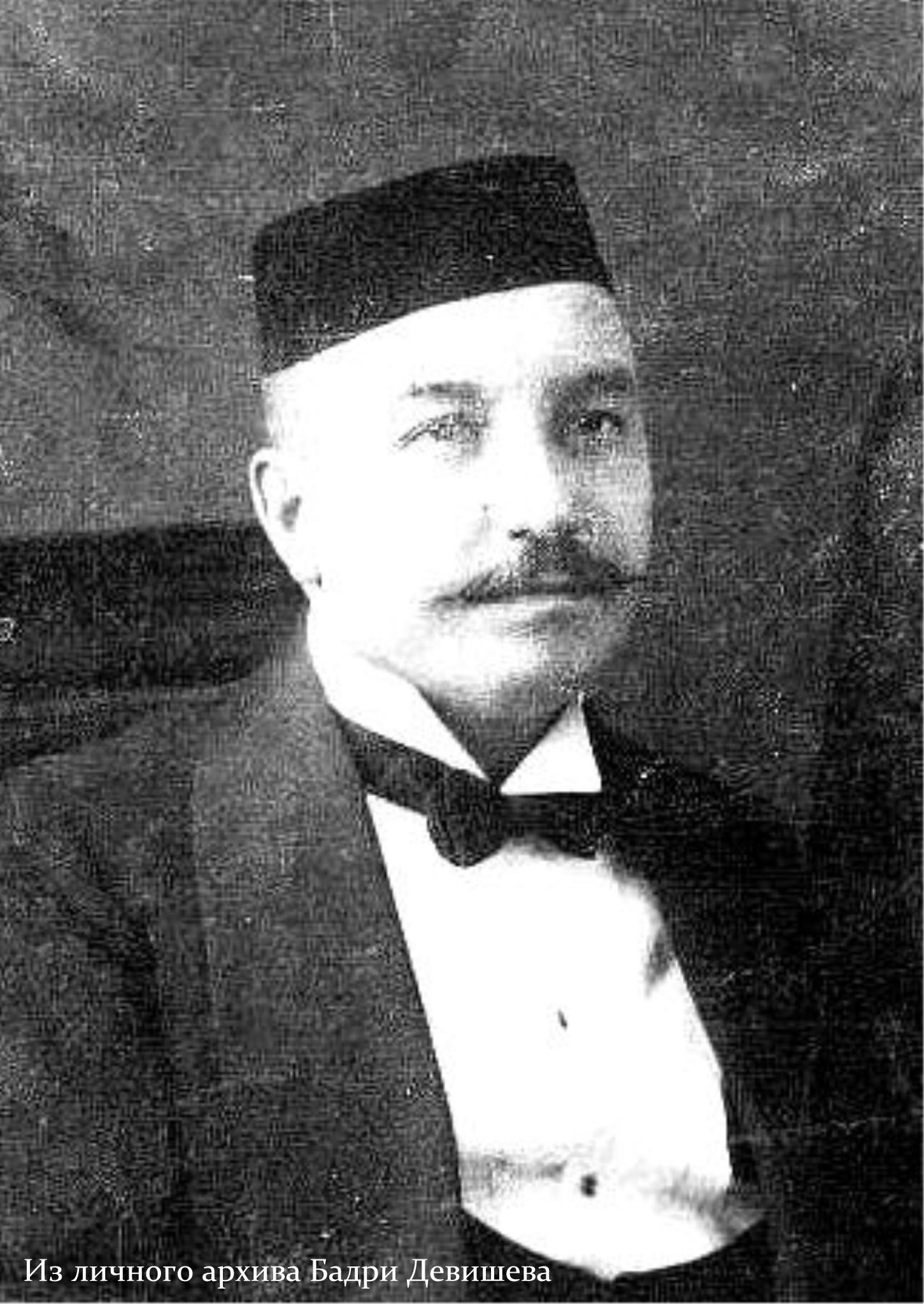 Кашафетдин Агафуров